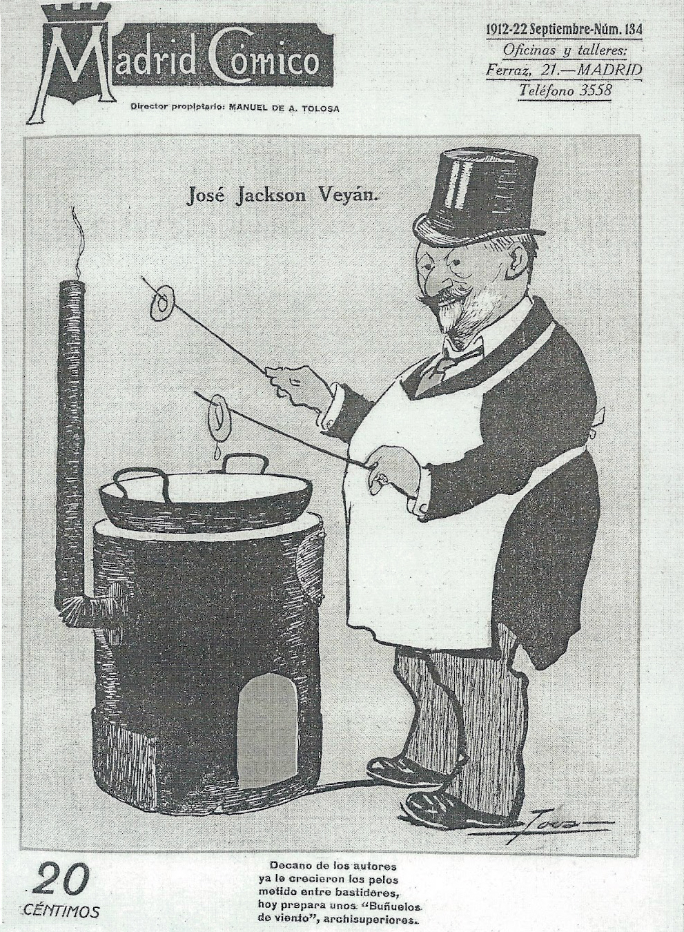 José Jackson Veyán.